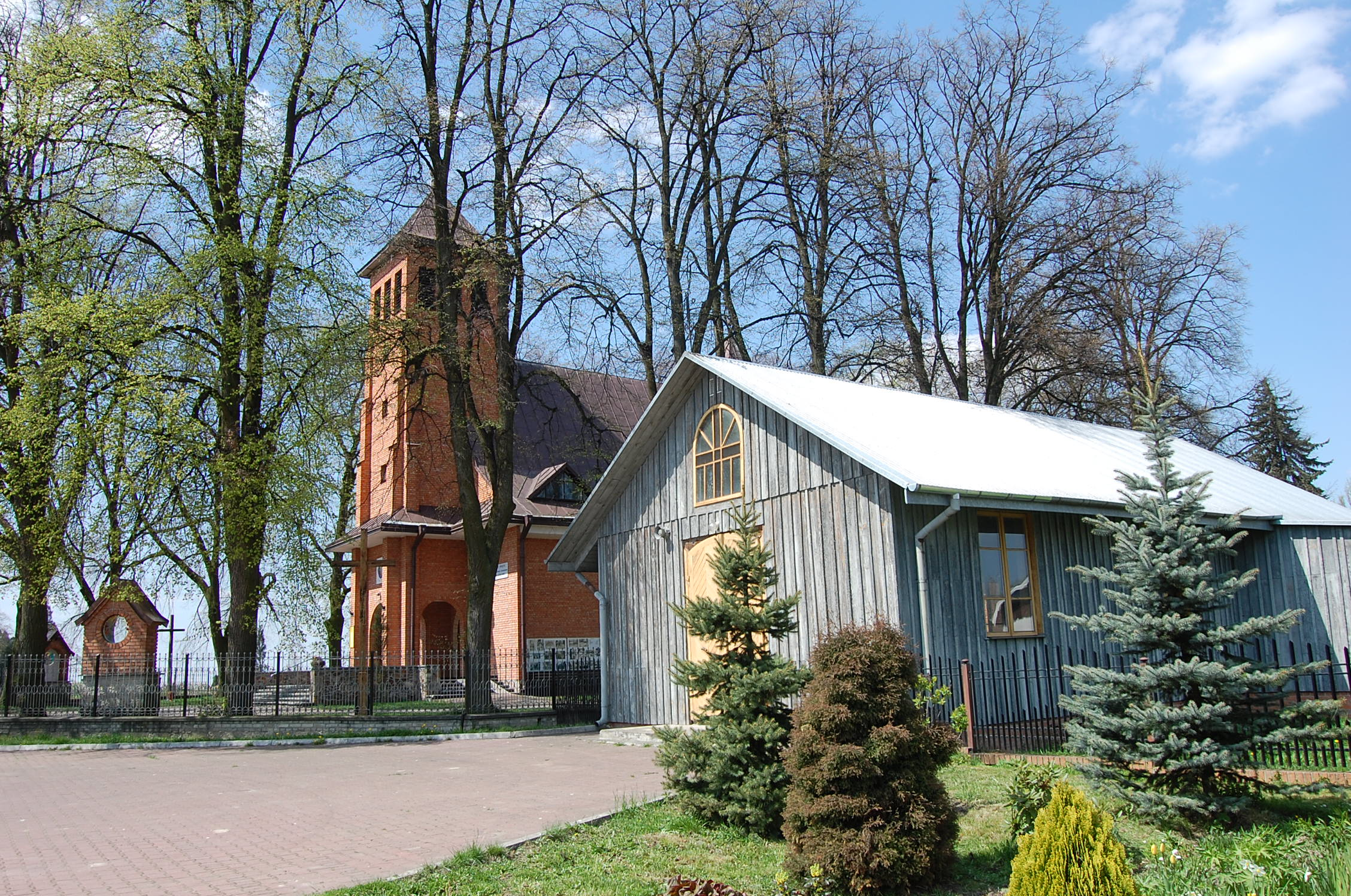 Widok na kaplicę i nowy kościół w Motyczu